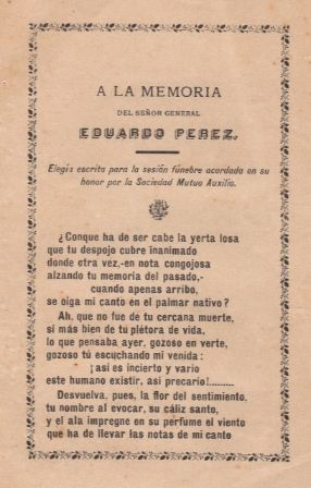 Elegía pronunciada por el poeta e intelectual zuliano Octavio Hernández, en el funeral de Eduardo Pérez Fabelo.